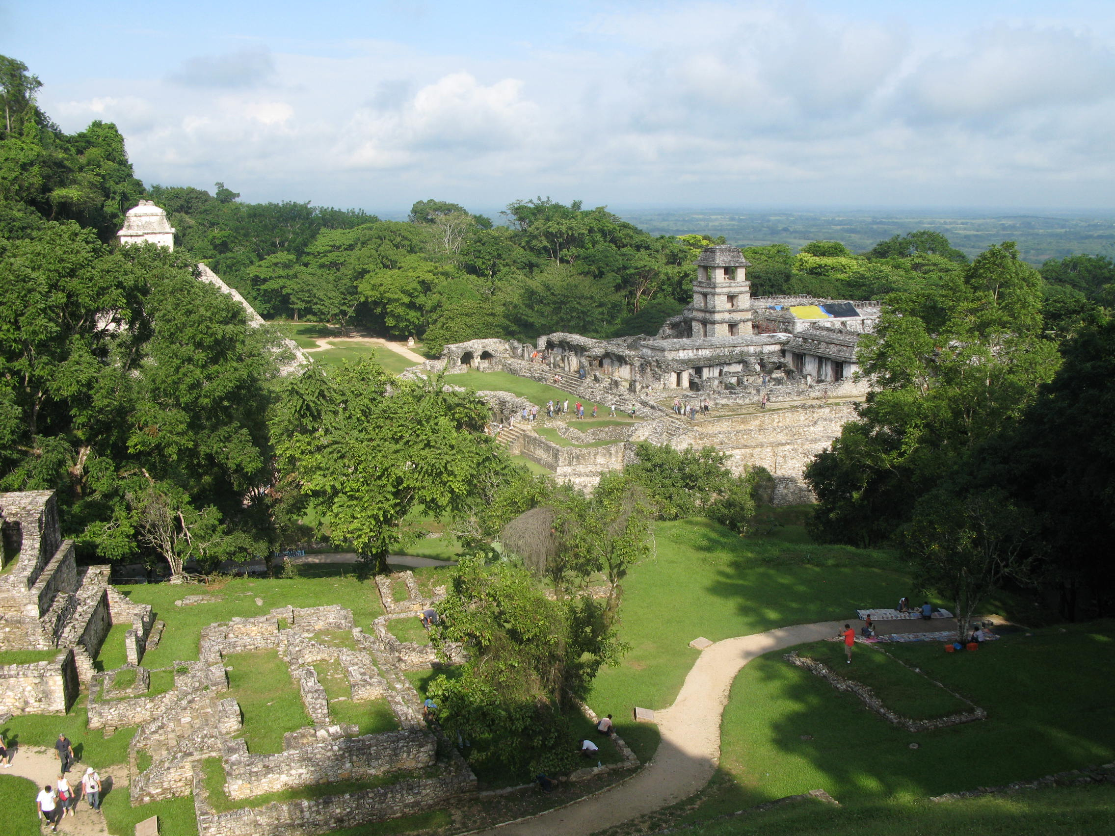 Palenque, Majevsko mesto, Mehika.